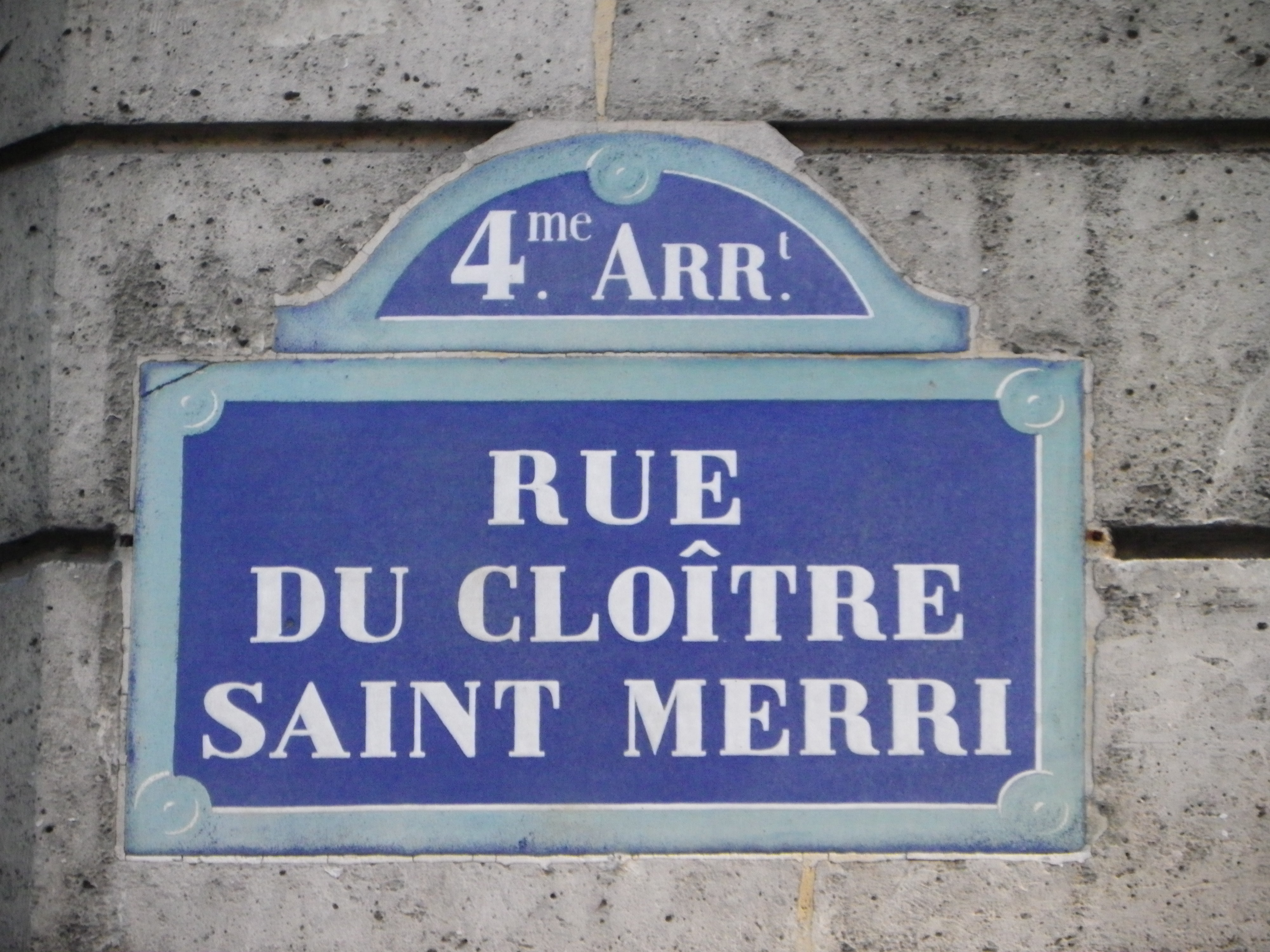 Plaque rue du Cloître Saint Merri à Paris